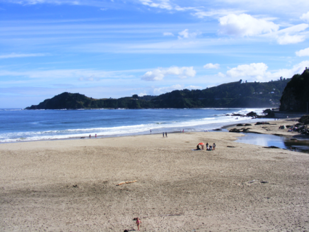 Fotografia tomada de la playa de Maicolpue Río Sur, en la comuna de San Juan de la costa, provincia de Osorno, Chile.